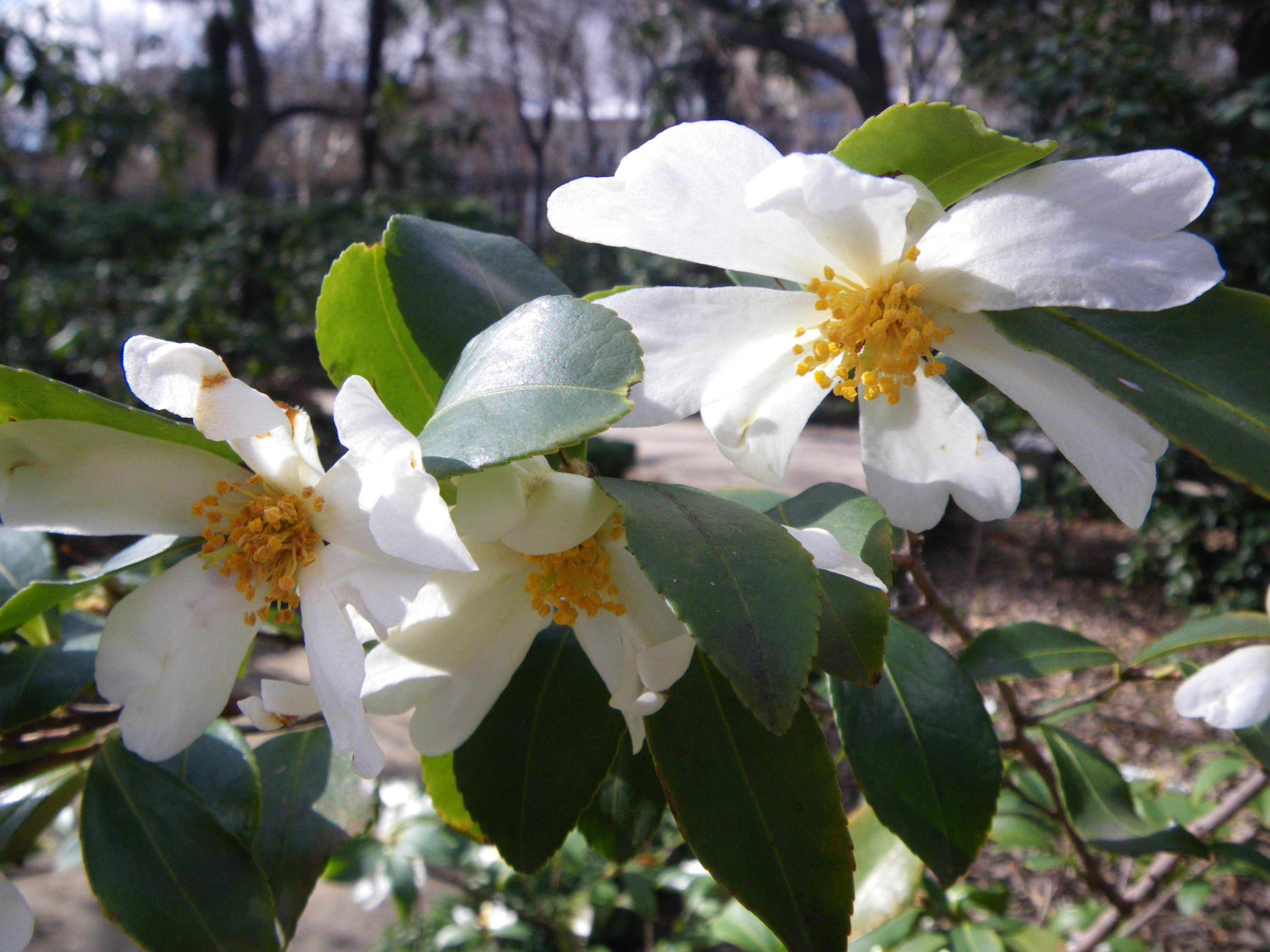 Tutcheria virgata. Real Jardín Botánico de Madrid.